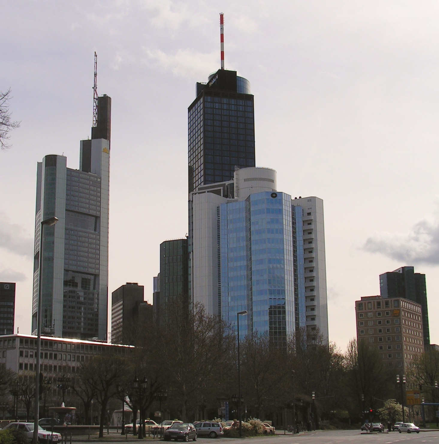 Frankfurt am Main Hessen Germany Skyline der Banken und Versicherungen 2005 Foto Wolfgang Pehlemann PICT0038